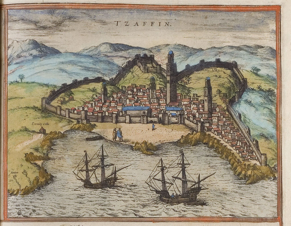 Safi